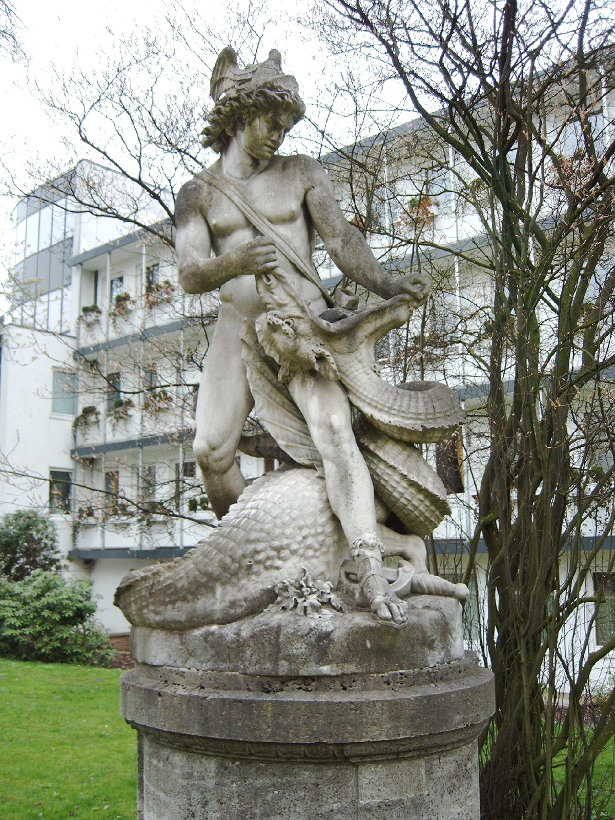 Siegfried sculptor Constantin Dausch made in Rome for Bremen 1890